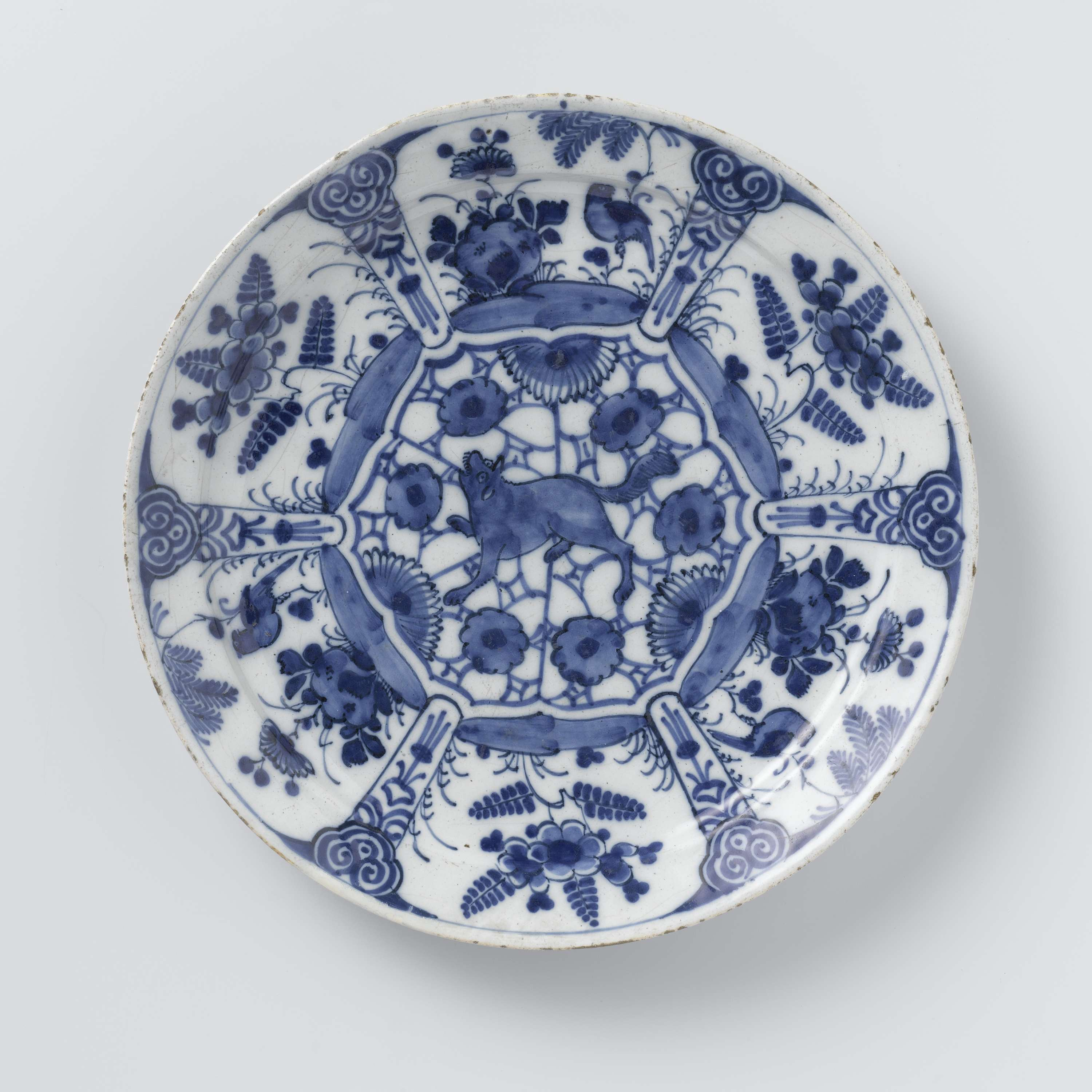 Rond bord van blauw beschilderde faience, met op het plat een zeshoekig medaillon waarbinnen een wolf of vos. De rand is in zes vakken verdeeld waarin planten en vogels. Het bord is aan de achterzijde gemerkt met het getal 3. Bij het bord horen twee identiek borden met de invnrs. BK-NM-4246 en BK-NM-4248.; plate (dishes)